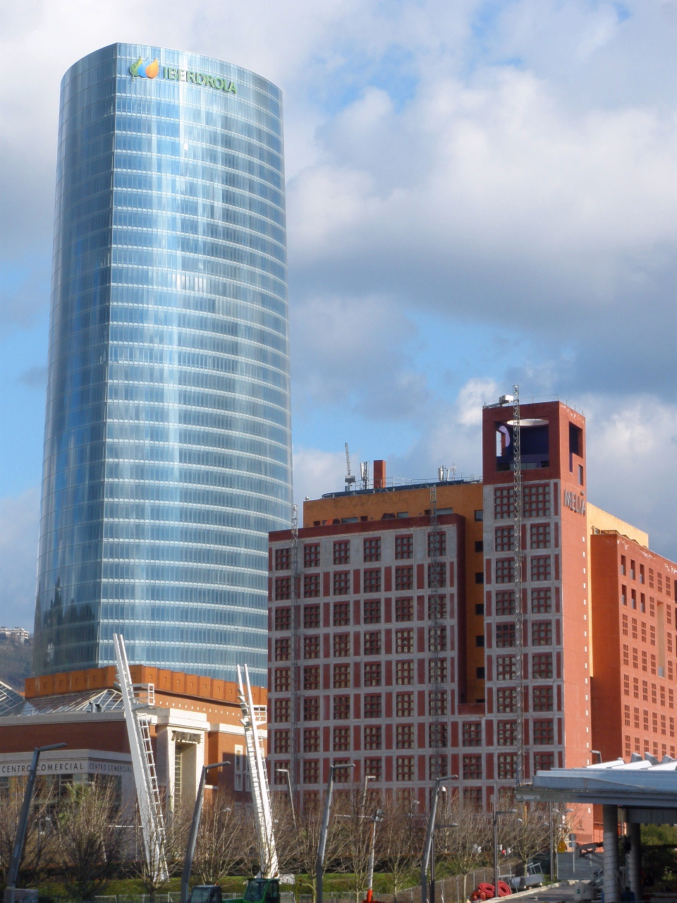 Bilbao - Torre Iberdrola y Hotel Melia